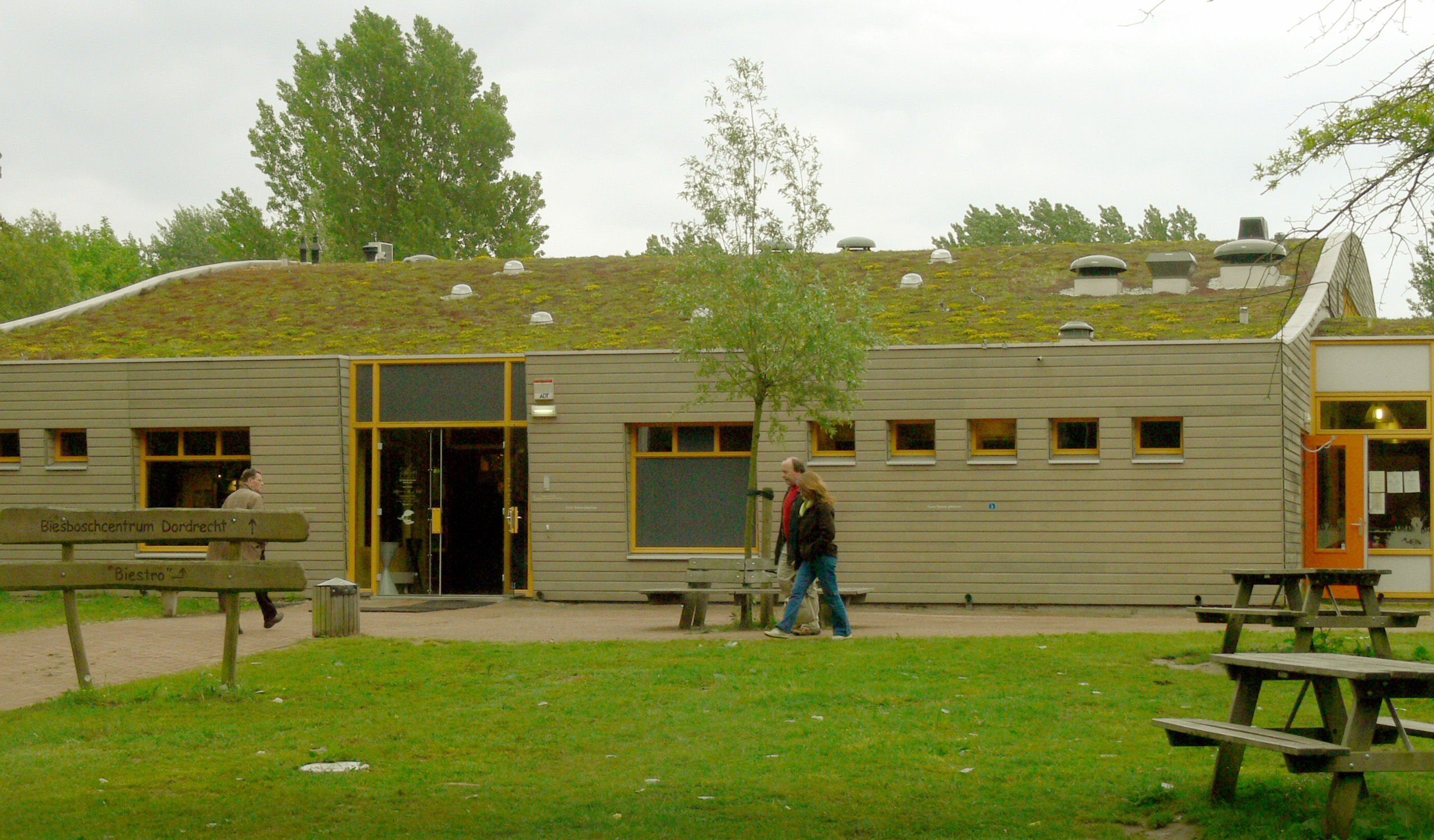 Zicht op een deel van het Biesboschcentrum Dordrecht, gevestigd aan de Baanhoekweg 53 in Dordrecht